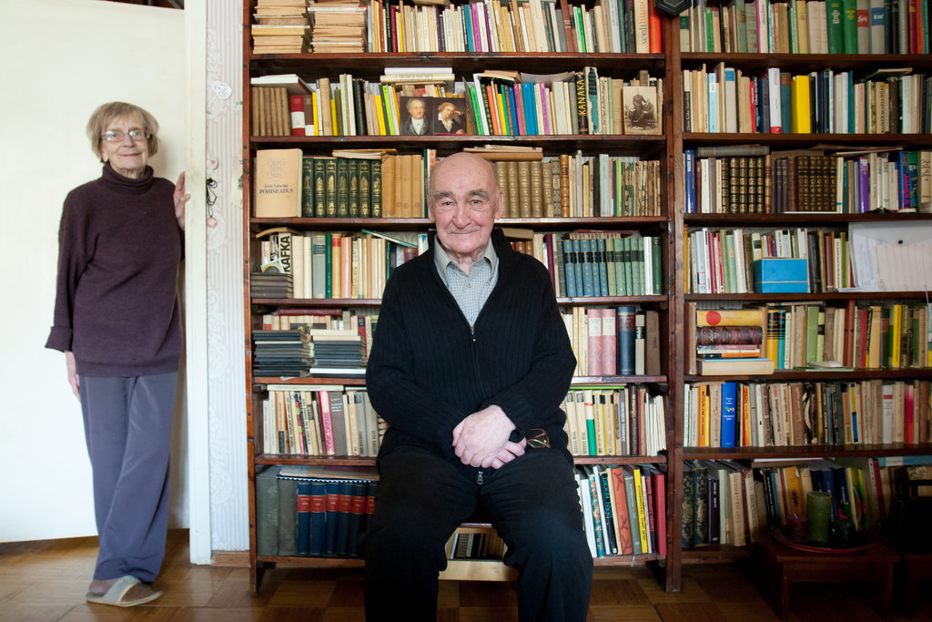 Luuletaja Ain Kaalep ja tema abikaasa Astrid Kaalep 2010. aastal oma kodus Elvas.